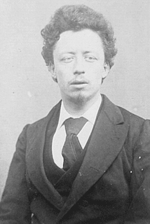 Henry Bauër (1851–1915), écrivain, polémiste, critique et journaliste français fils d'Alexandre Dumas